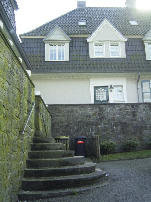 Häuser der Gartenstadt Margarethenhöhe in Essen März 2004 Autor: Denis Barthel Lizenz: GNU-FDL